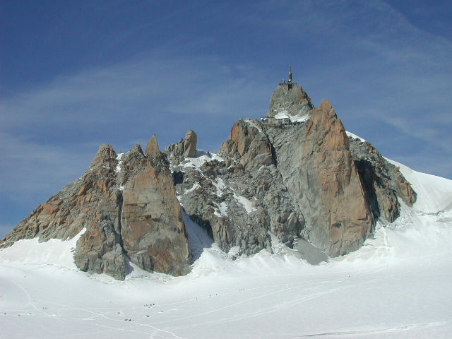 Face Sud de l'Aiguille du Midi - Aiguille du Midi South Face. (France, Massif du Mont Blanc) Photo R. Lacassin.